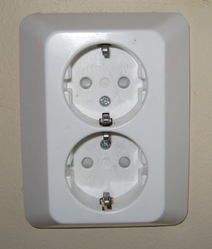 Elektrisk stikkontakt (230 V) med jord.